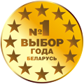 Медаль международного фестиваля-конкурса